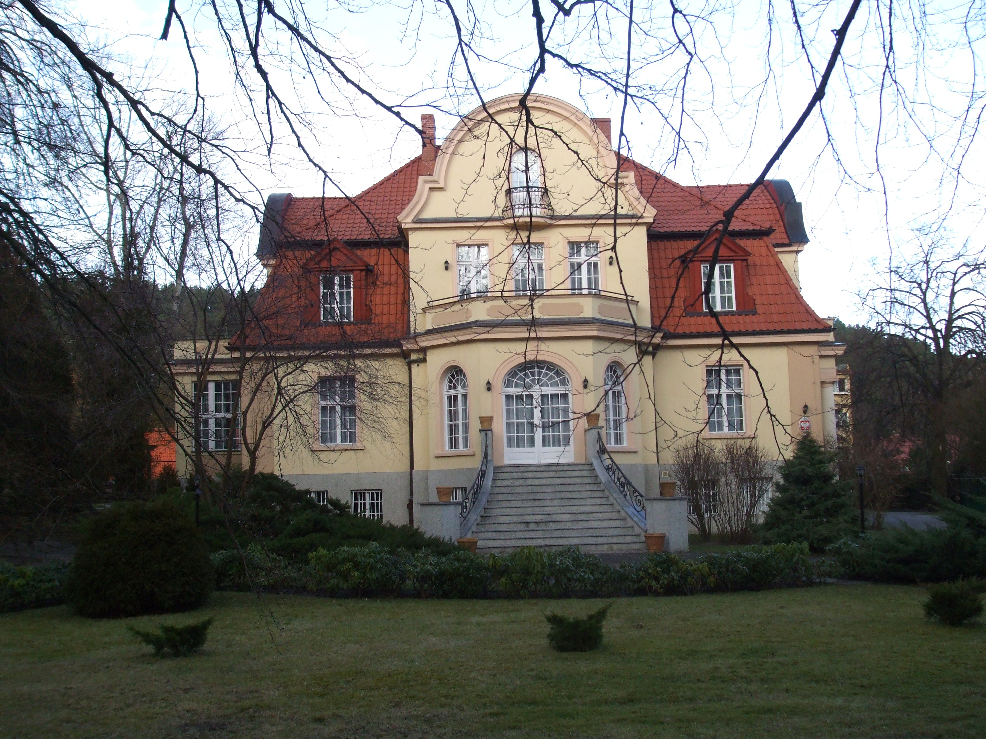 Sopot Górny, ul. Mickiewicza 34-36 - willa "Belwederek", obecnie żłobek, 1920